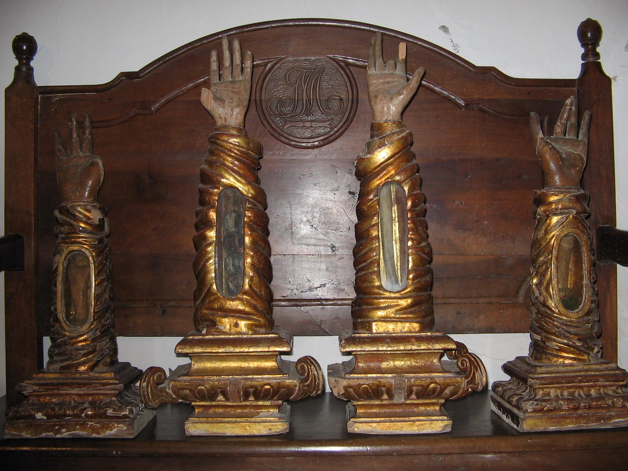 Brazos relicarios en madera dorada que se guardan en la iglesia parroquial de San Pedro de Ayerbe en España Museo religioso de Ayerbe